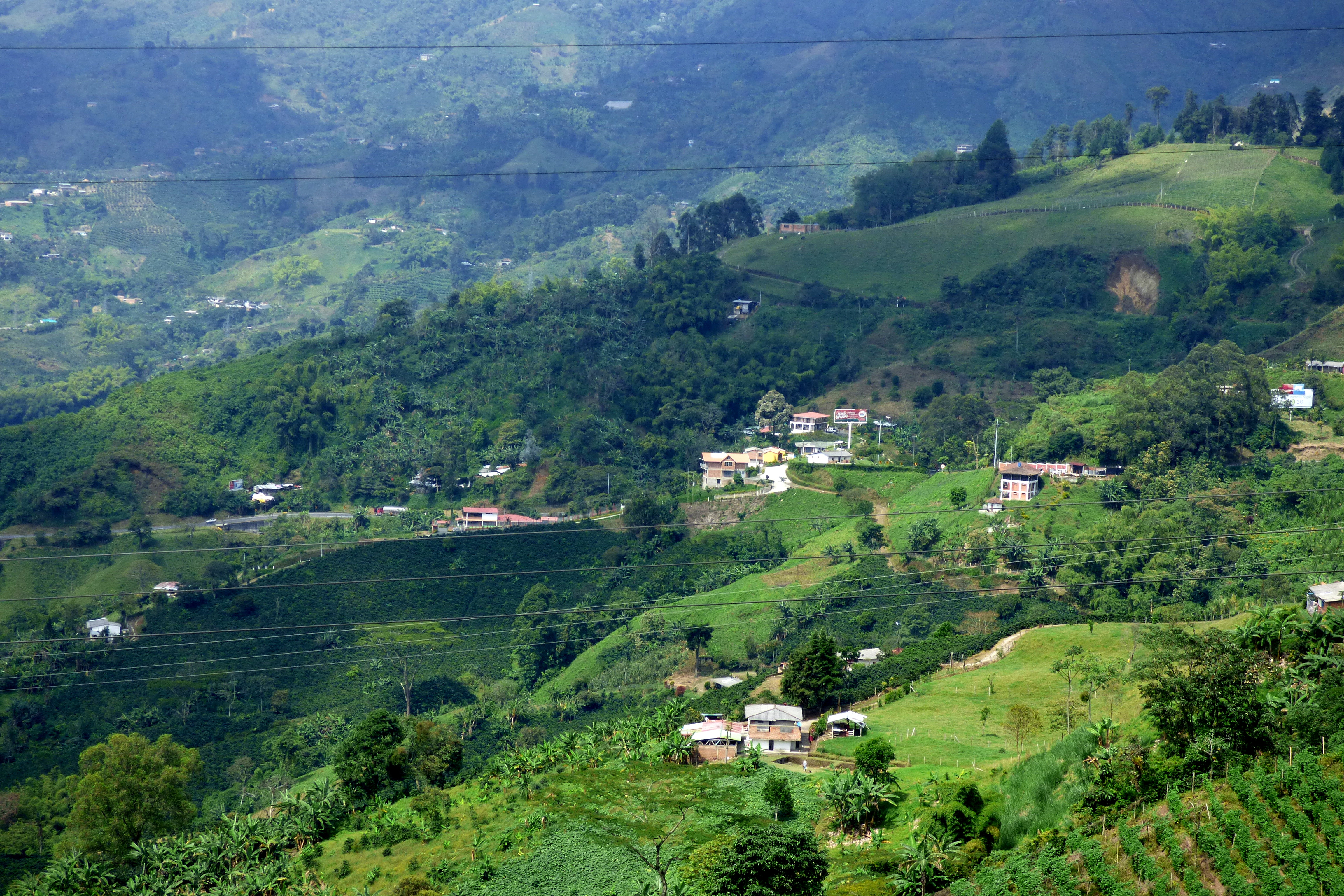 Vista de Dosquebradas y Pereira desde el alto del Boquerón